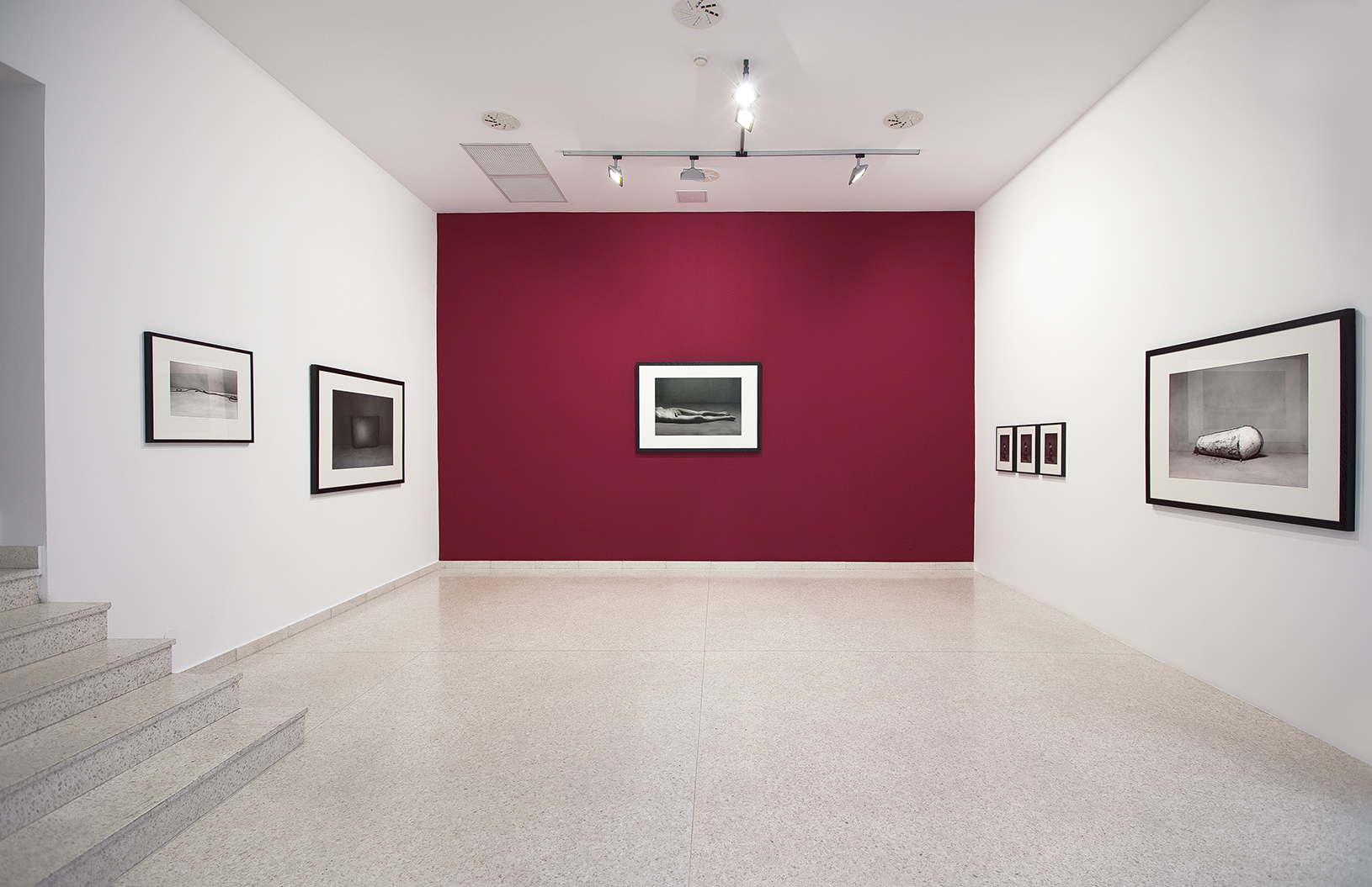 výstava Ivana Pinakvy